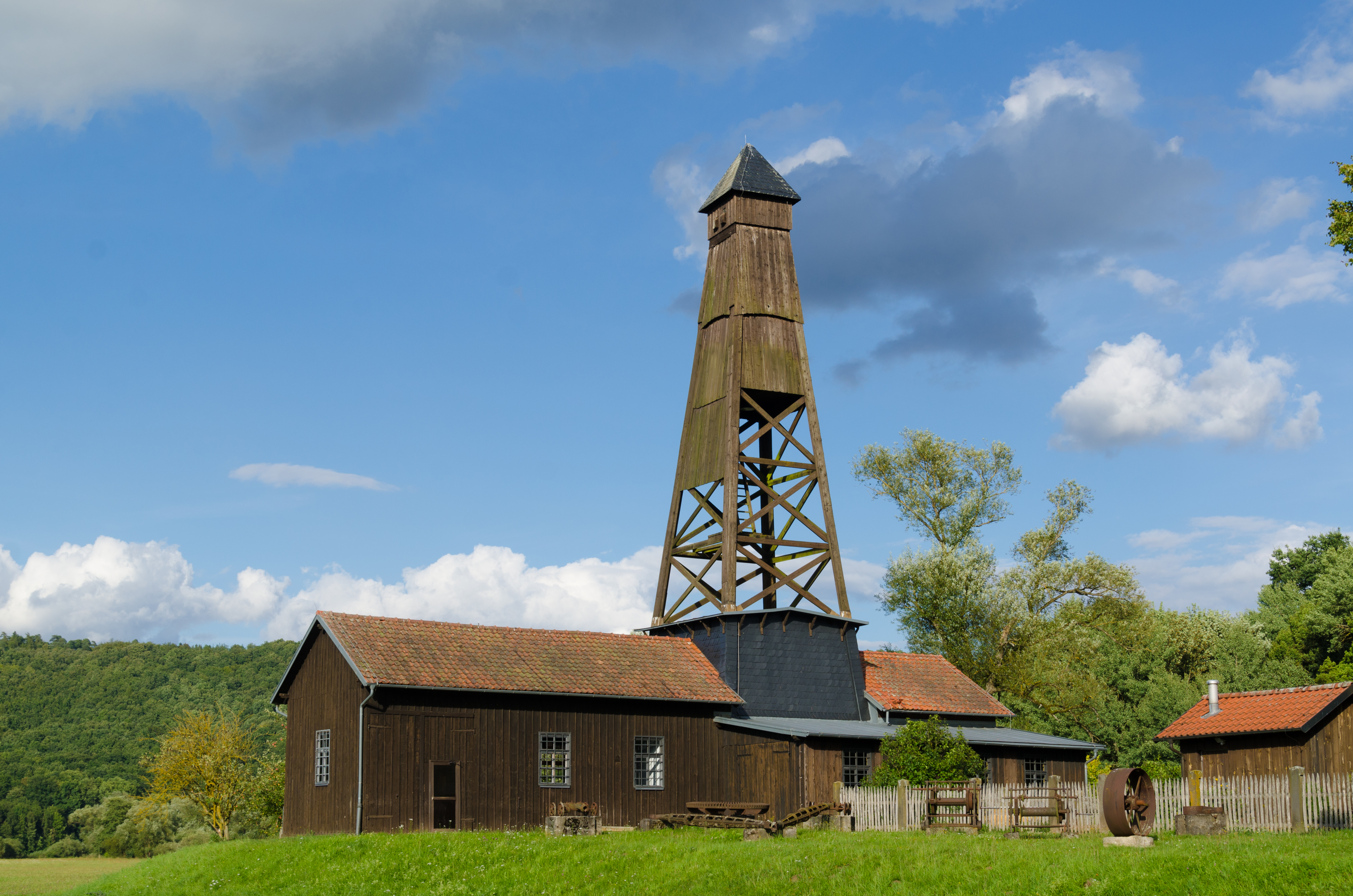 Bohrturm Luitpoldsprudel in Bad Bocklet-Großenbrach